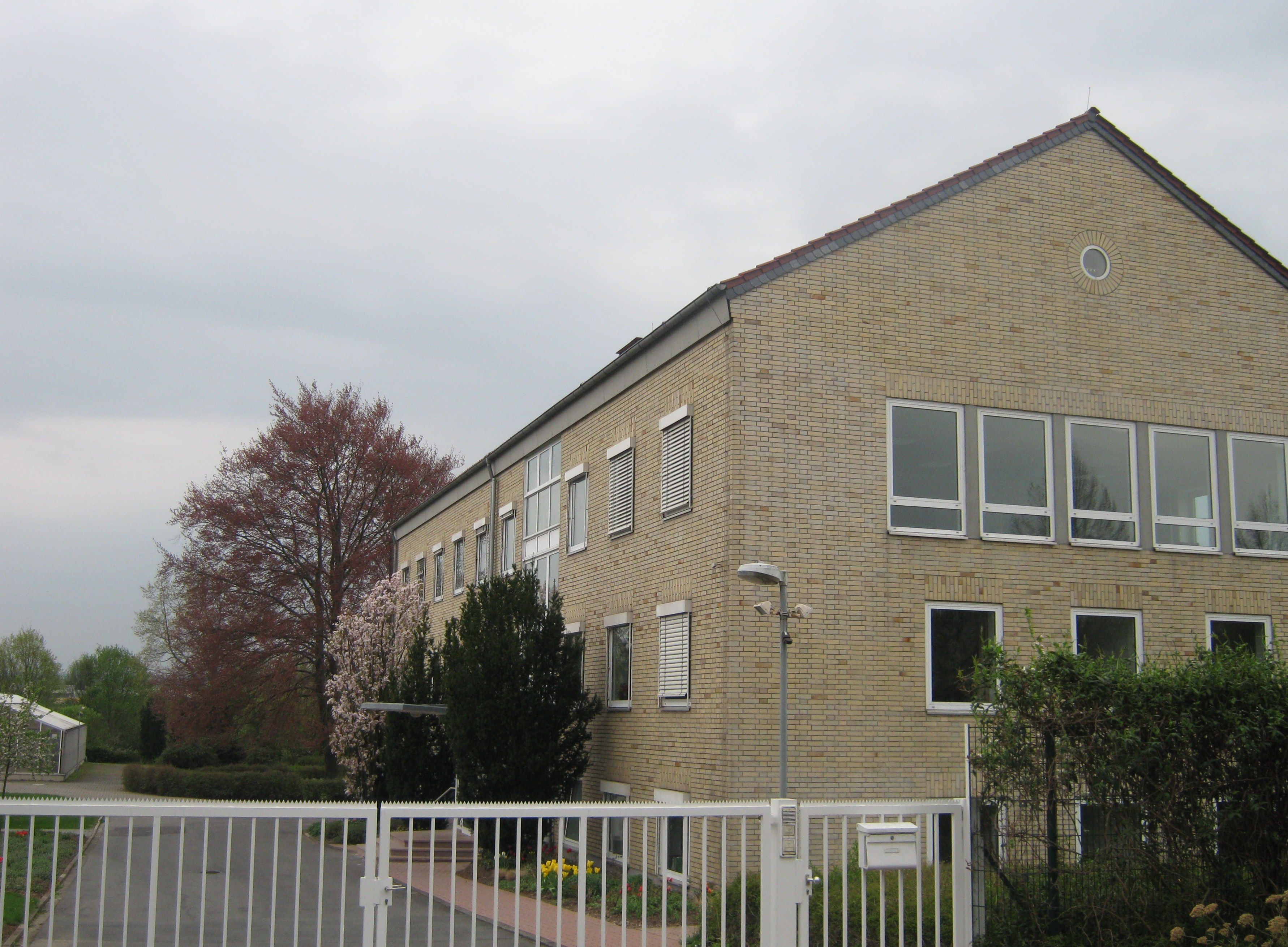 Institut für Zuckerrübenforschung der Universität Göttingen, Holtenser Landstraße, Göttingen